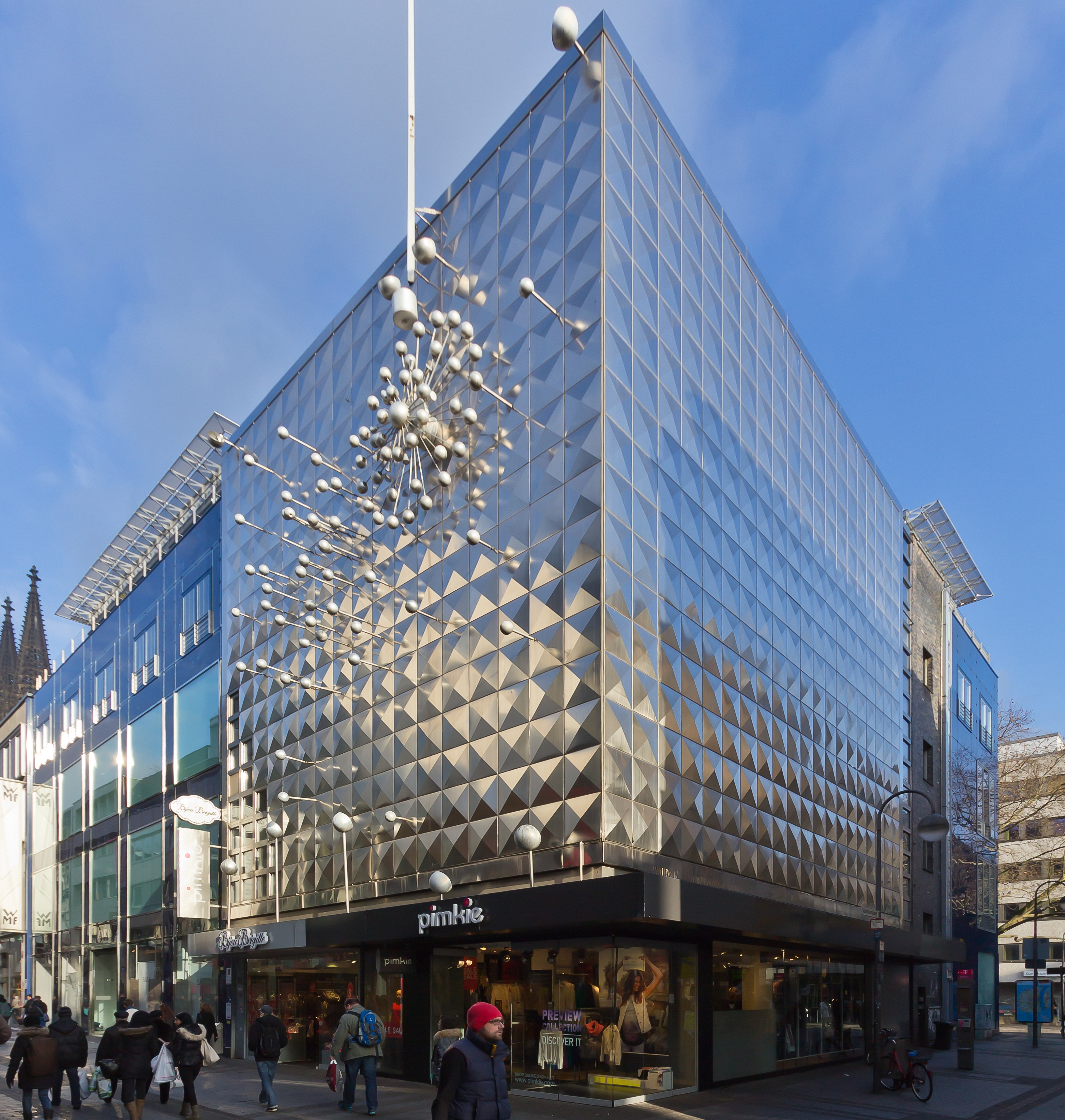 Geschäftshaus Hohe Straße in Köln mit der elektronisch programmierten kinetischen Lichtplastik „Licht und Bewegung“ von Otto Piene, 1966